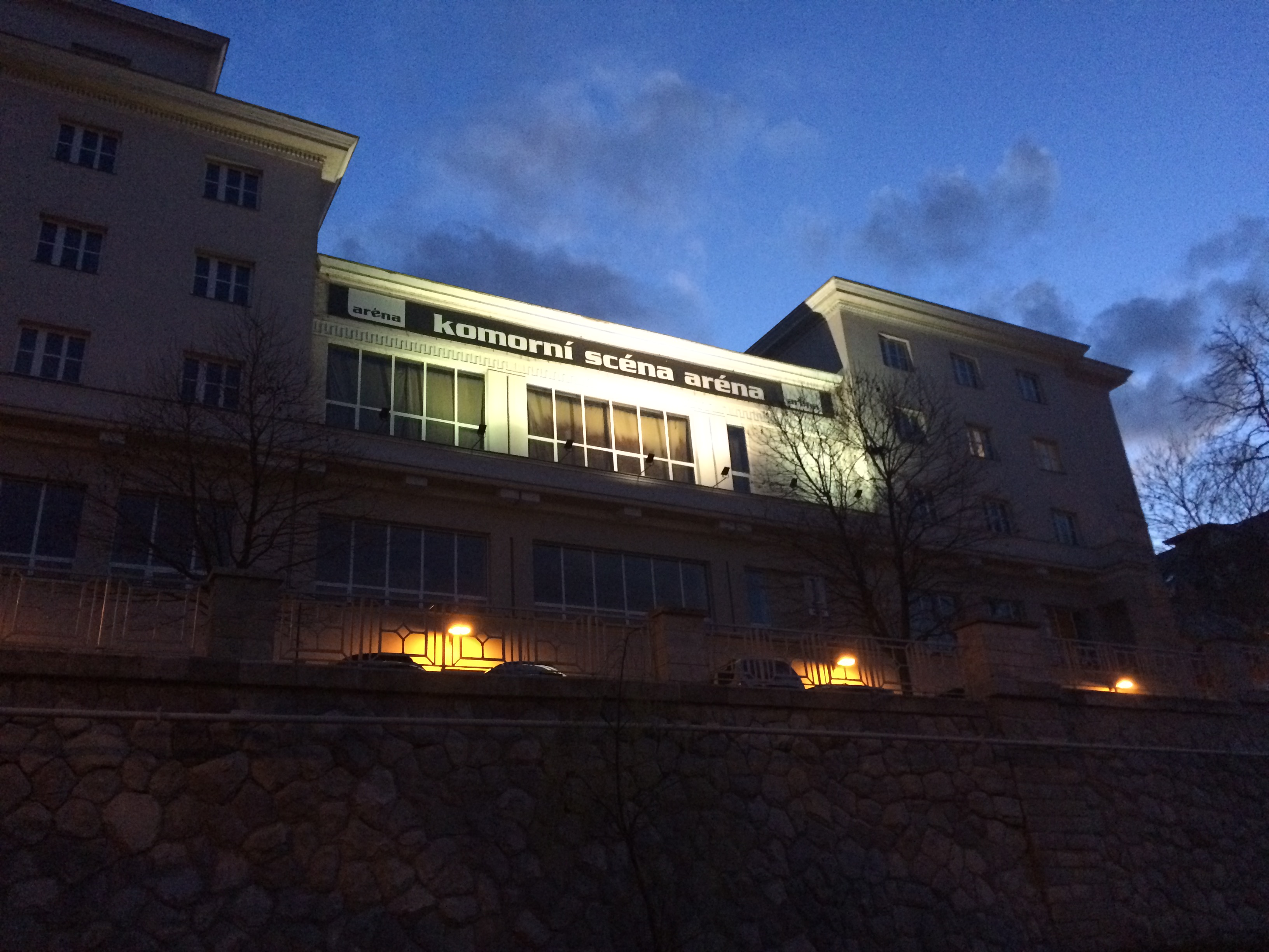 Noční pohled